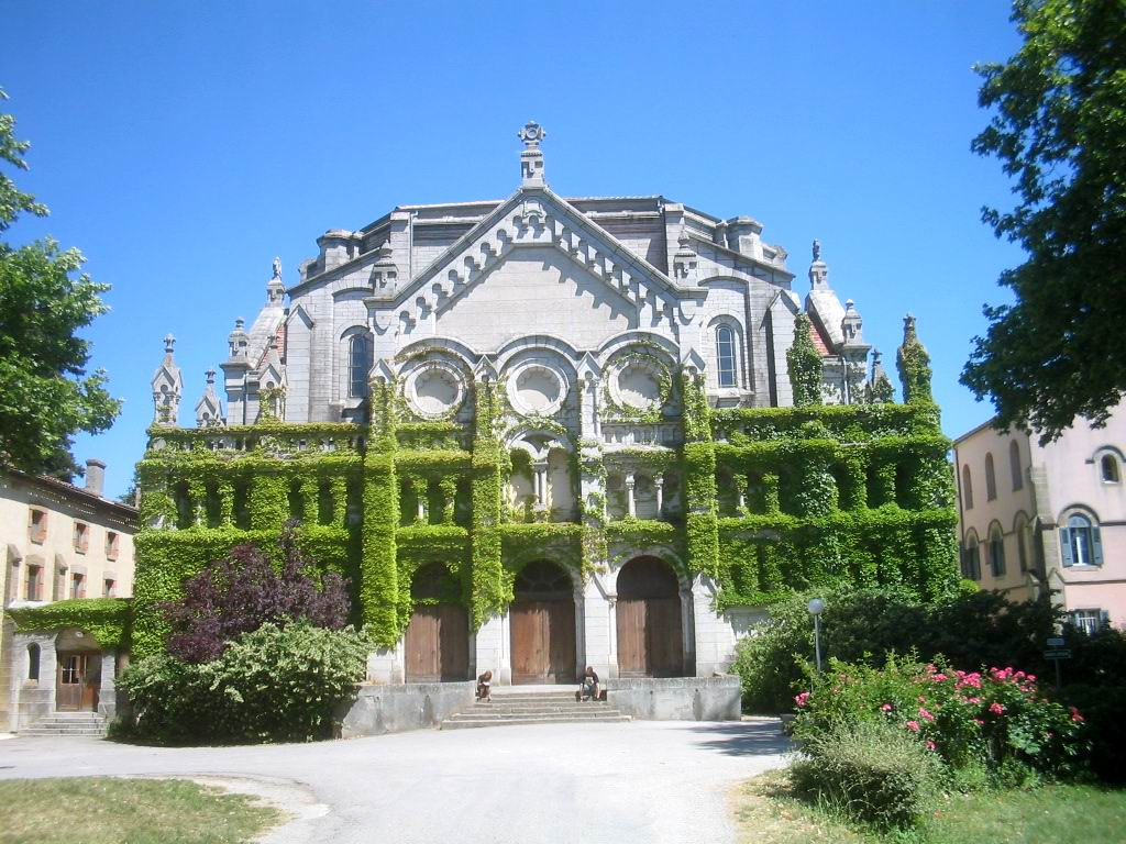 Monastère de Prouille